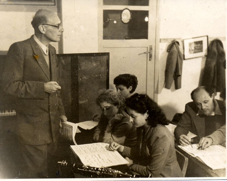 פאול בן-חיים בשיעור לסטודנטים למוסיקה (מס' קטלוגי: MUS 055 / M76)